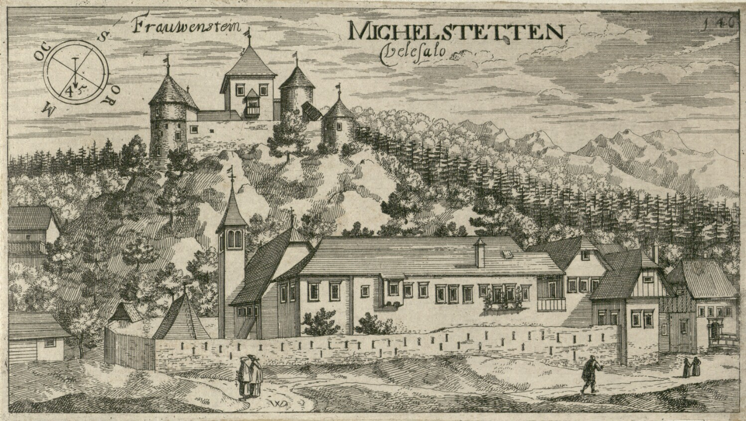 Grad Kamen pri Velesovem